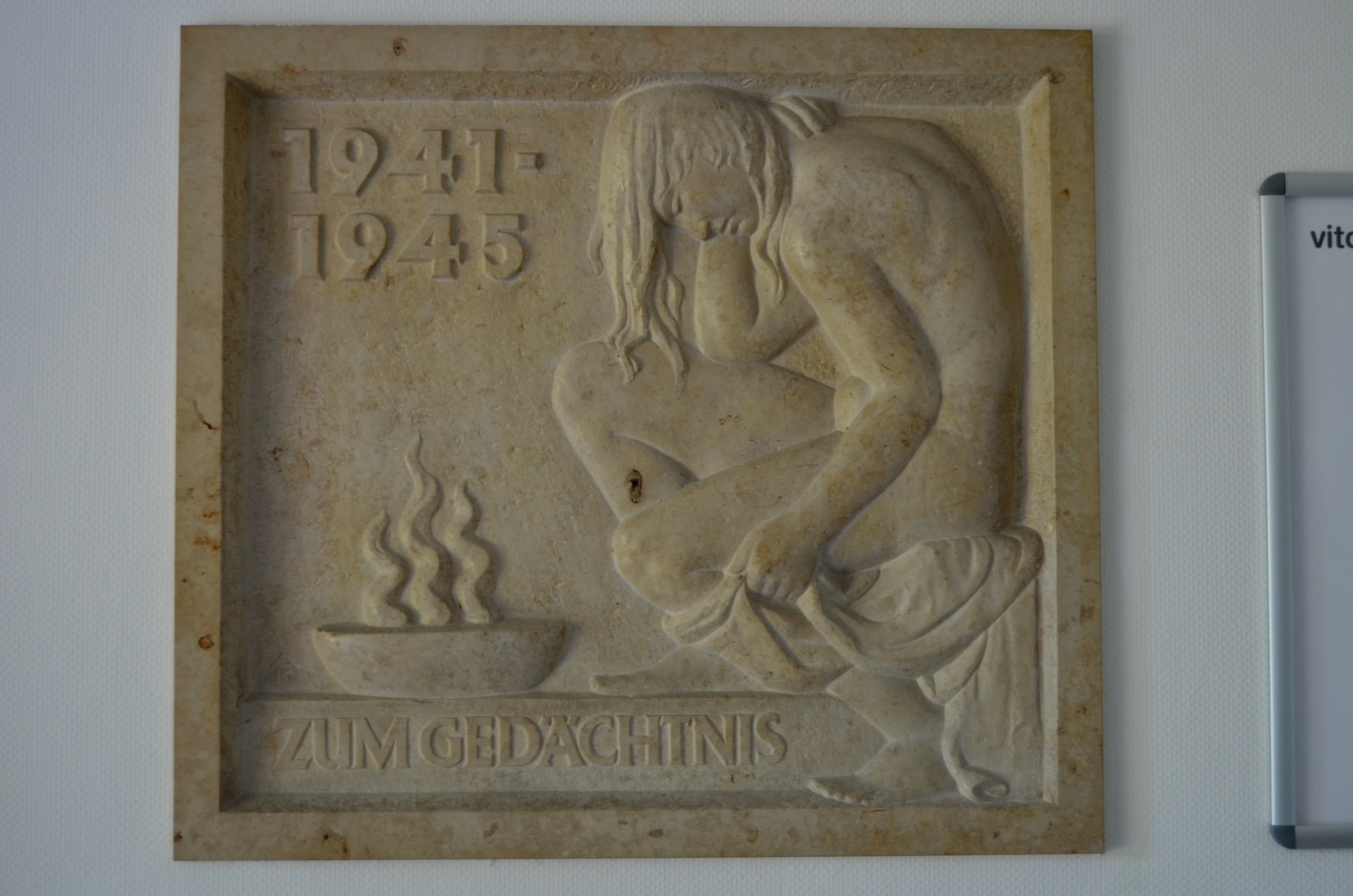 Gedenkstätte Hadamar. Relief des Künstlers Anton Krams aus Kiedrich am Eingang der Gedenkstätte, 1953